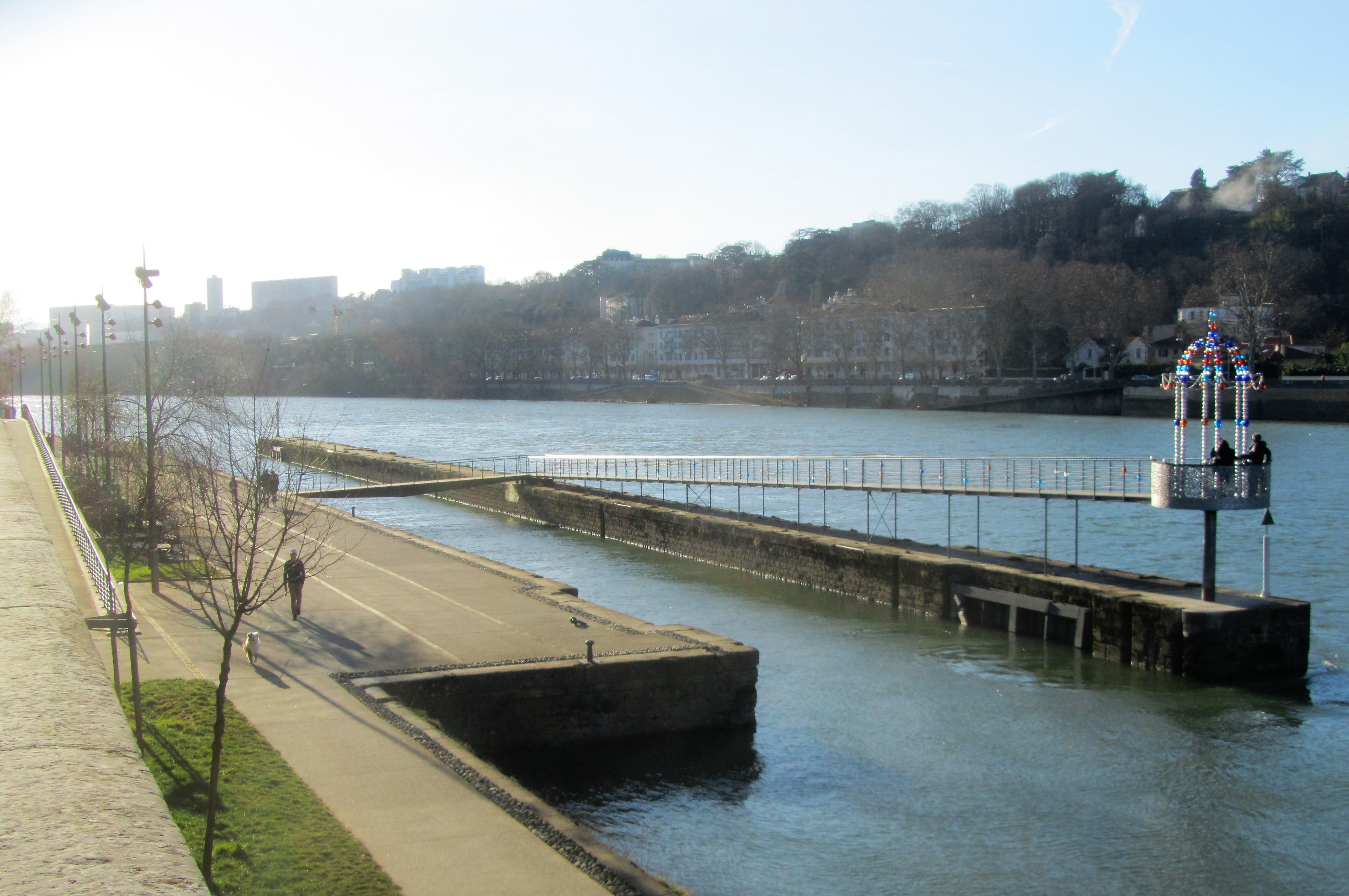 cette écluse a été supprimée après la construction du barrage de Pierre-Bénite sur le Rhône